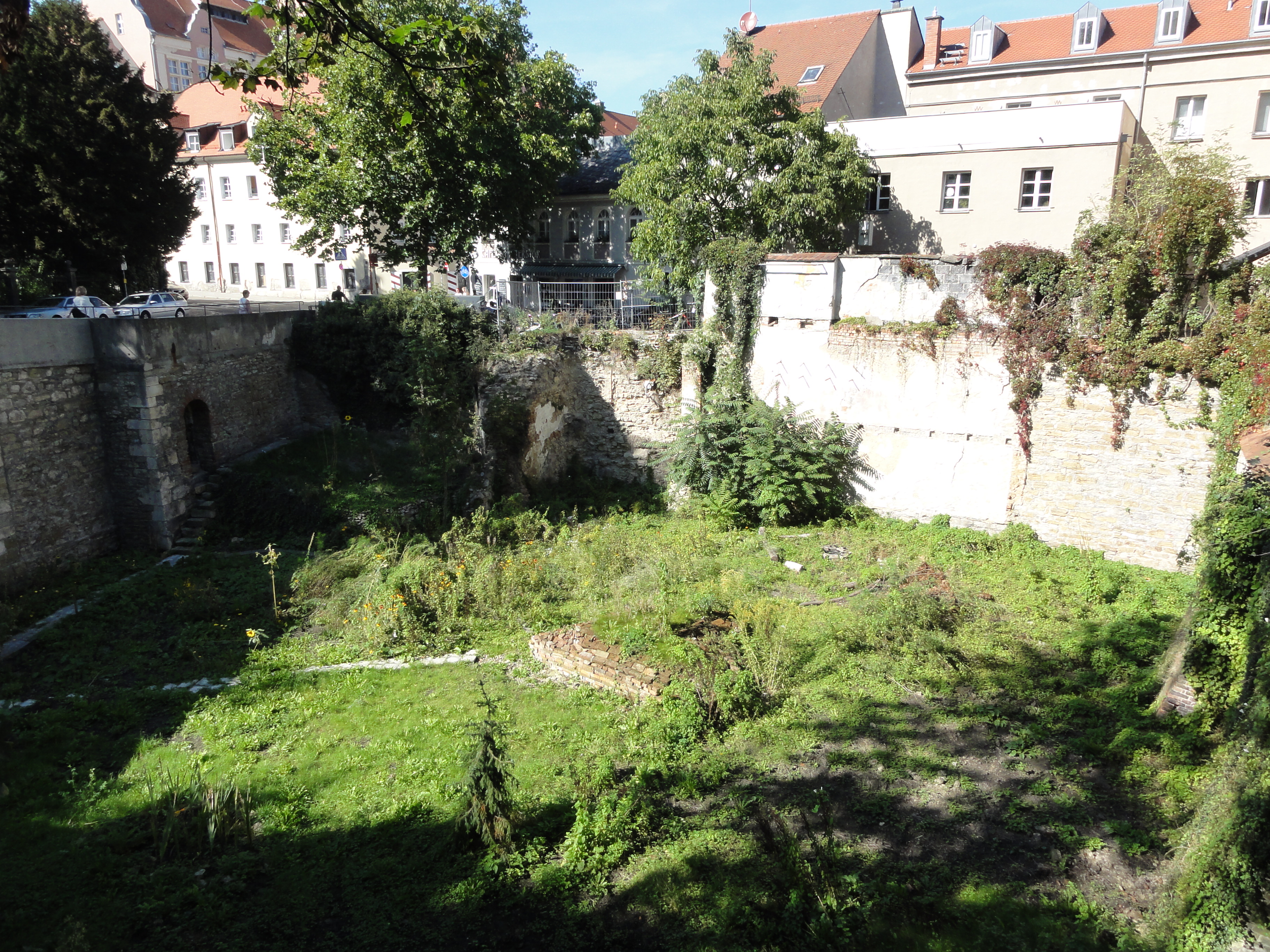 Regensburg - Reste des ehemaligen Peterstors / Stadtmauer. Man blickt in den ehemaligen Stadtgraben (links die Brücke) und in das Zwingerareal auf den Standort des ehemaligen östlichen Begleitturm des Peterstors. Heute steht dort ein turmartiger Neubau (erbaut 2016) und deshalb ist diese Ansicht bereits historisch geworden